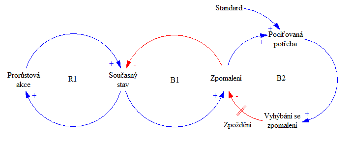 Vytvořeno ve Vensim PLE 6.0